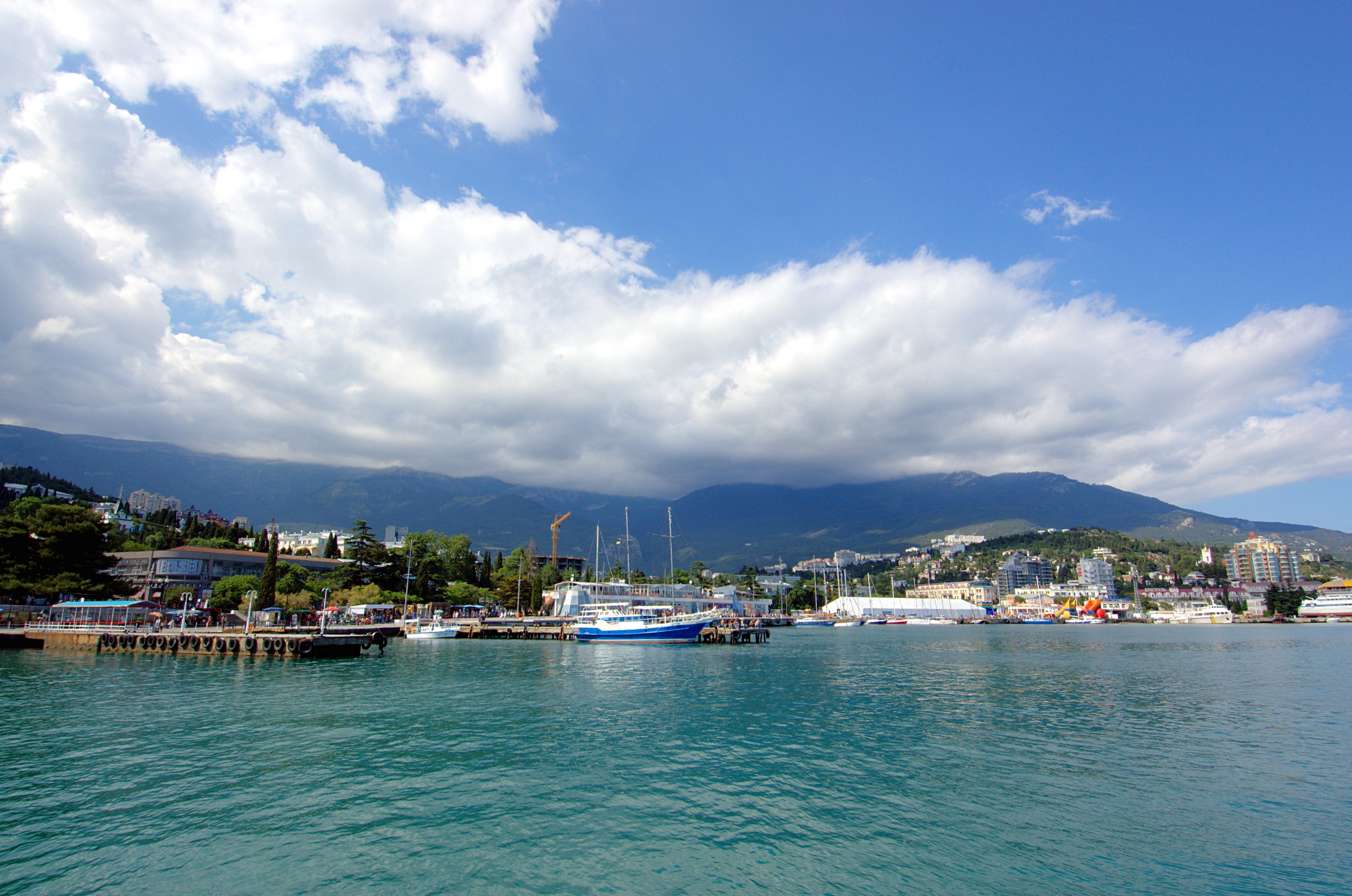 Yalta bay